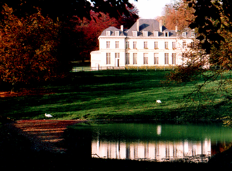 Château de Pas-en-Artois (Pas-de-Calais), FR.